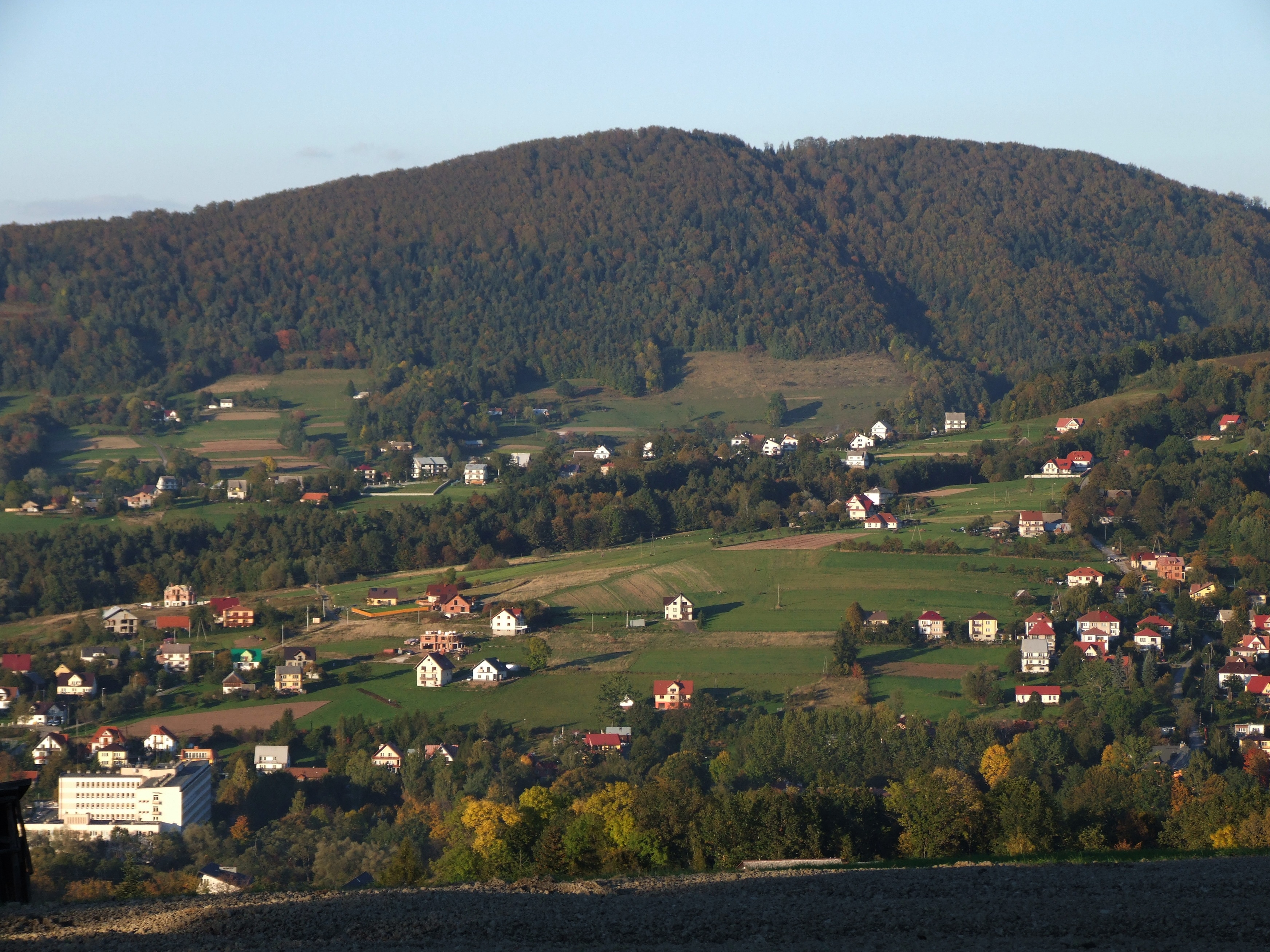 Groń w Paśmie Łososińskim. Widok z Lipowego. Na dole Limanowa-Sowliny